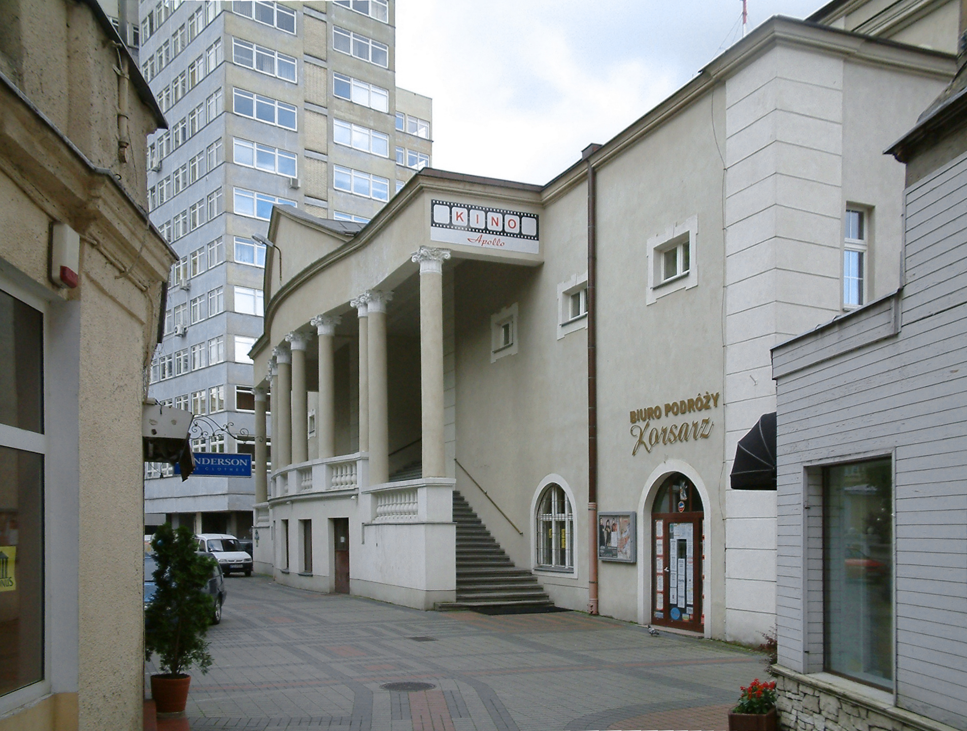 Apollo Cinema in Poznań